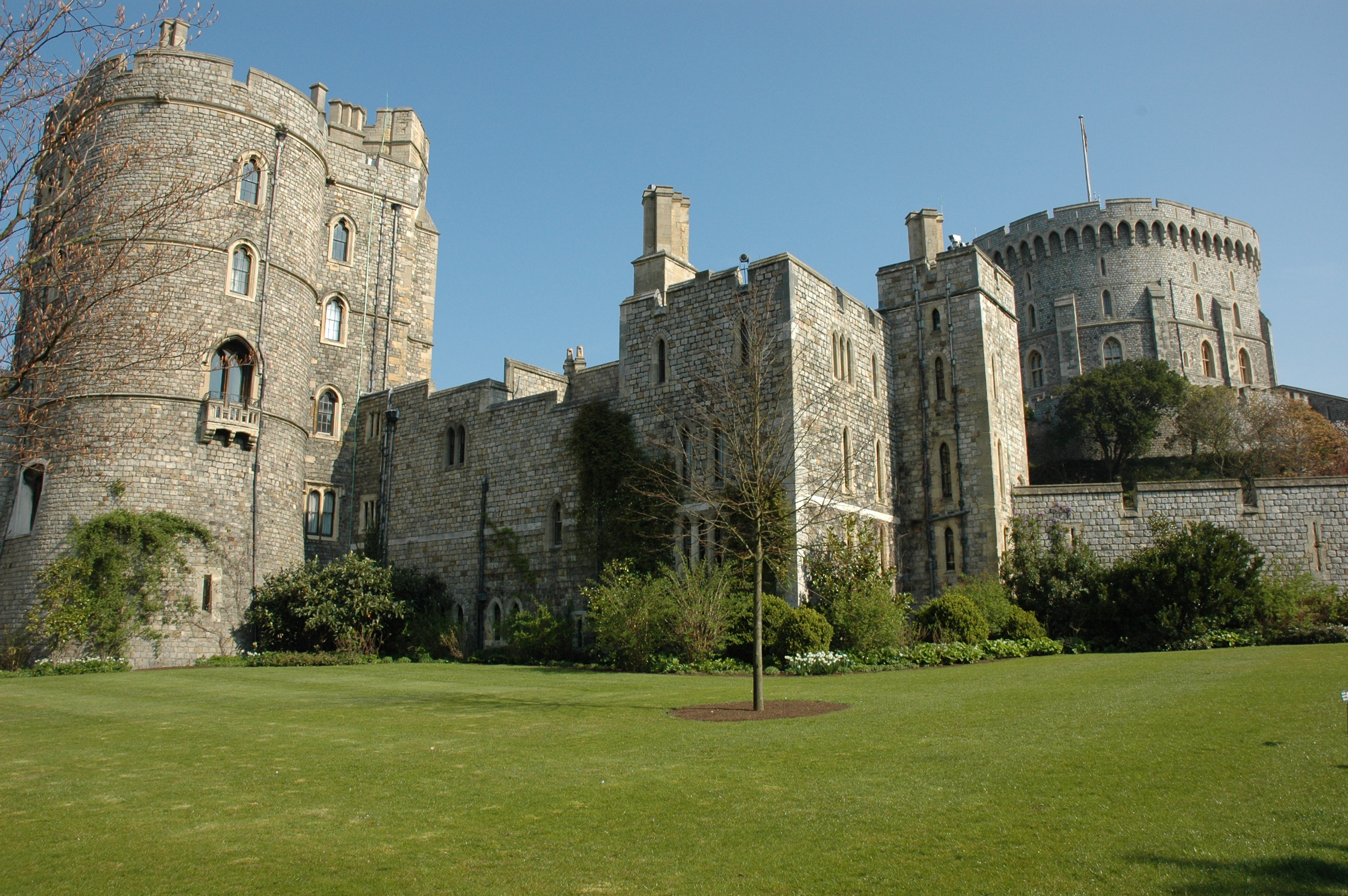 Castell de Windsor